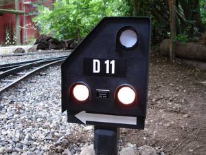 Zwergsignal